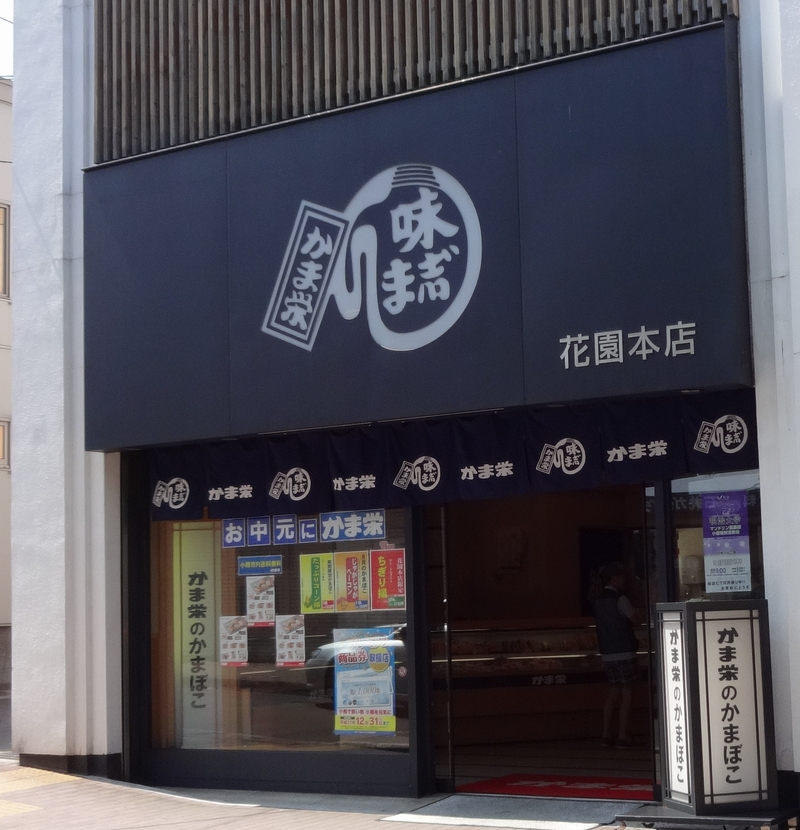 かま栄 (Kamaboko shop, Otaru-shi, Japan)